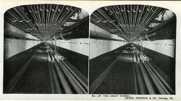 Die Werbekarte zeigt den von Menschen begehbaren großen Verbindungstunnel mit Leitungsbauten für Wasser, klimatisierte Luft, Elektrizität und die Rohrpoströhren der Hausrohrpostanlage